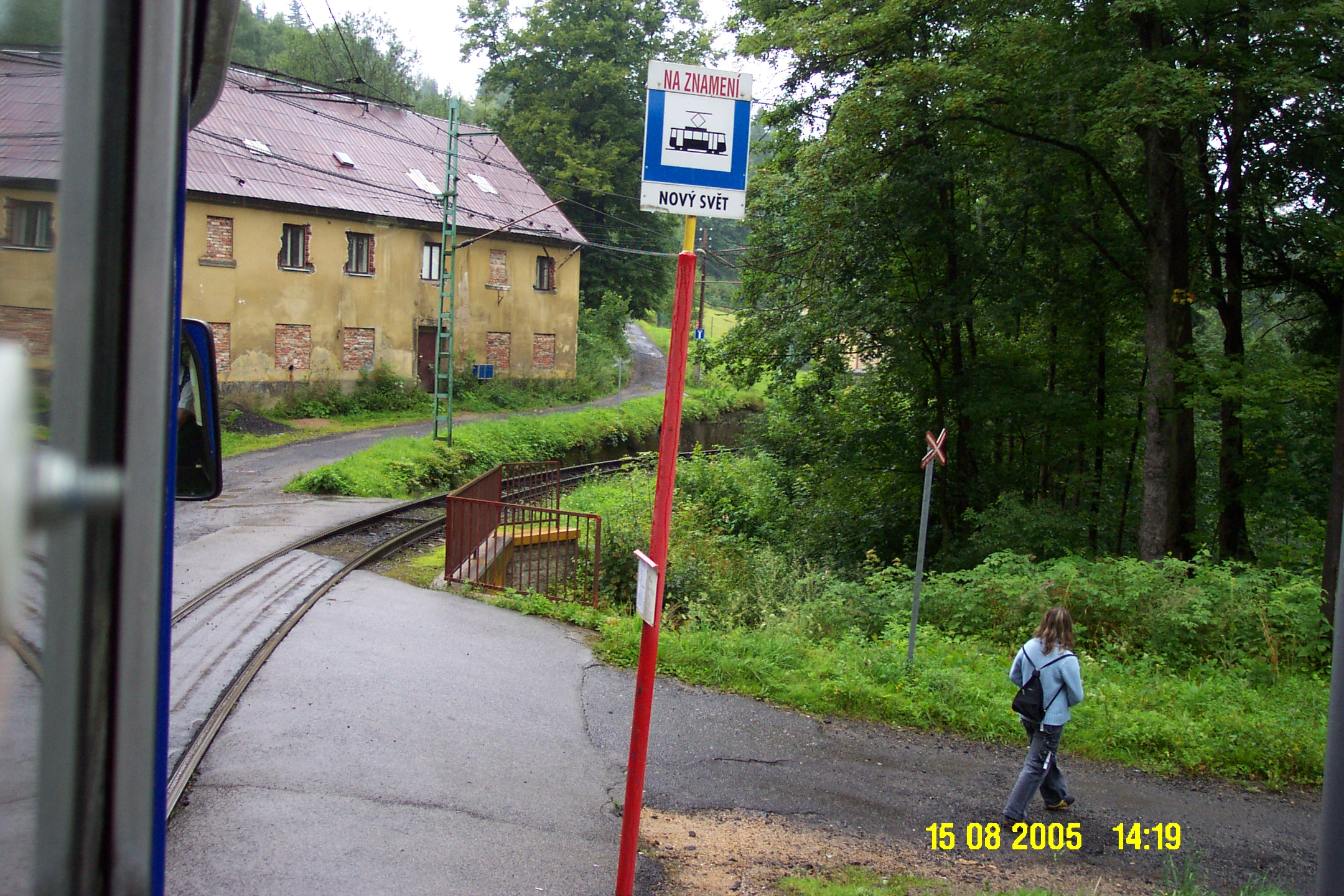 Tramvajová trať Liberec - Jablonec. Zastávka Nový svět směrem od Jablonce k Proseči.